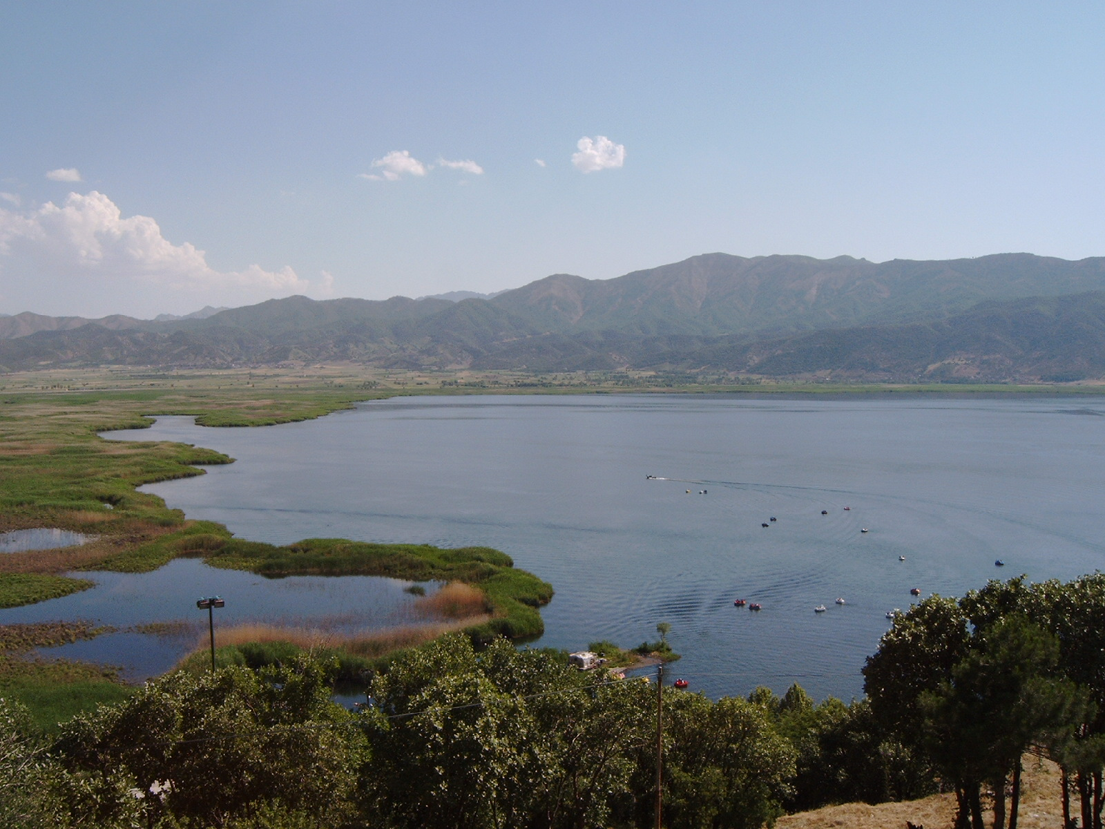 Zarivar See nahe Marivan in der Provinz Kordestan in Iran 2006. goranmariwane